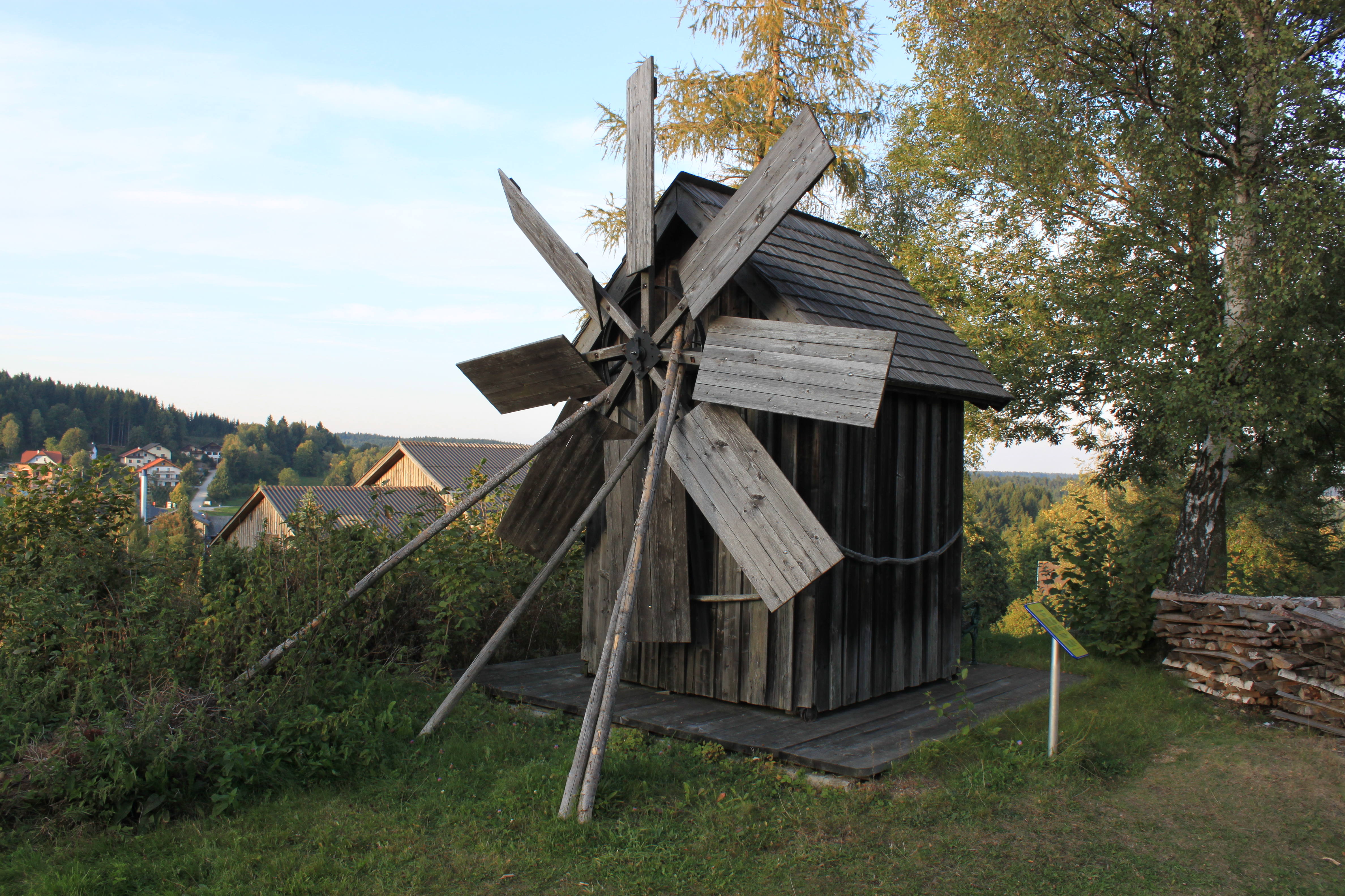 Windmühle in Bad Traunstein, Niederösterreich